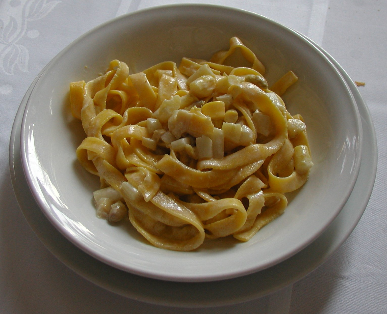 Fettuccine al sugo di asparagi di Vicenza